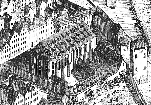 Die Minoriten- bzw. Sophienkirche in Dresden um 1634